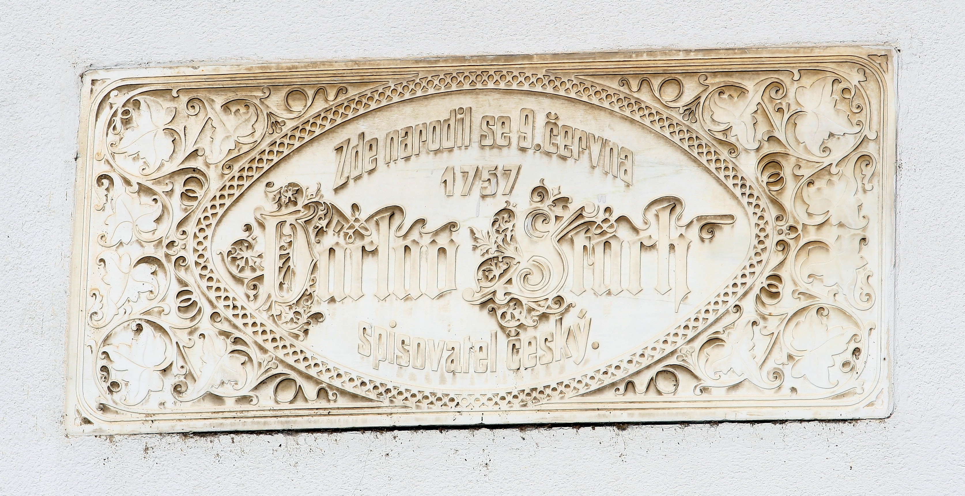 Pamětní deska připomínající narození spisovatele Václava Stacha. Umístěna na spořitelně, Masarykovo nám. 111, Přeštice.